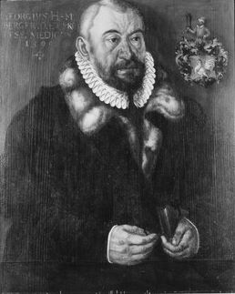 Bild in der Tübinger Professorengalerie